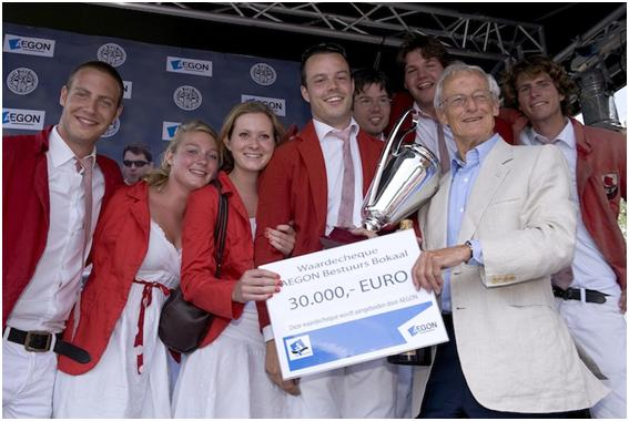 D.S.R.V. Laga neemt de Aegon Bokaal in ontvangst.